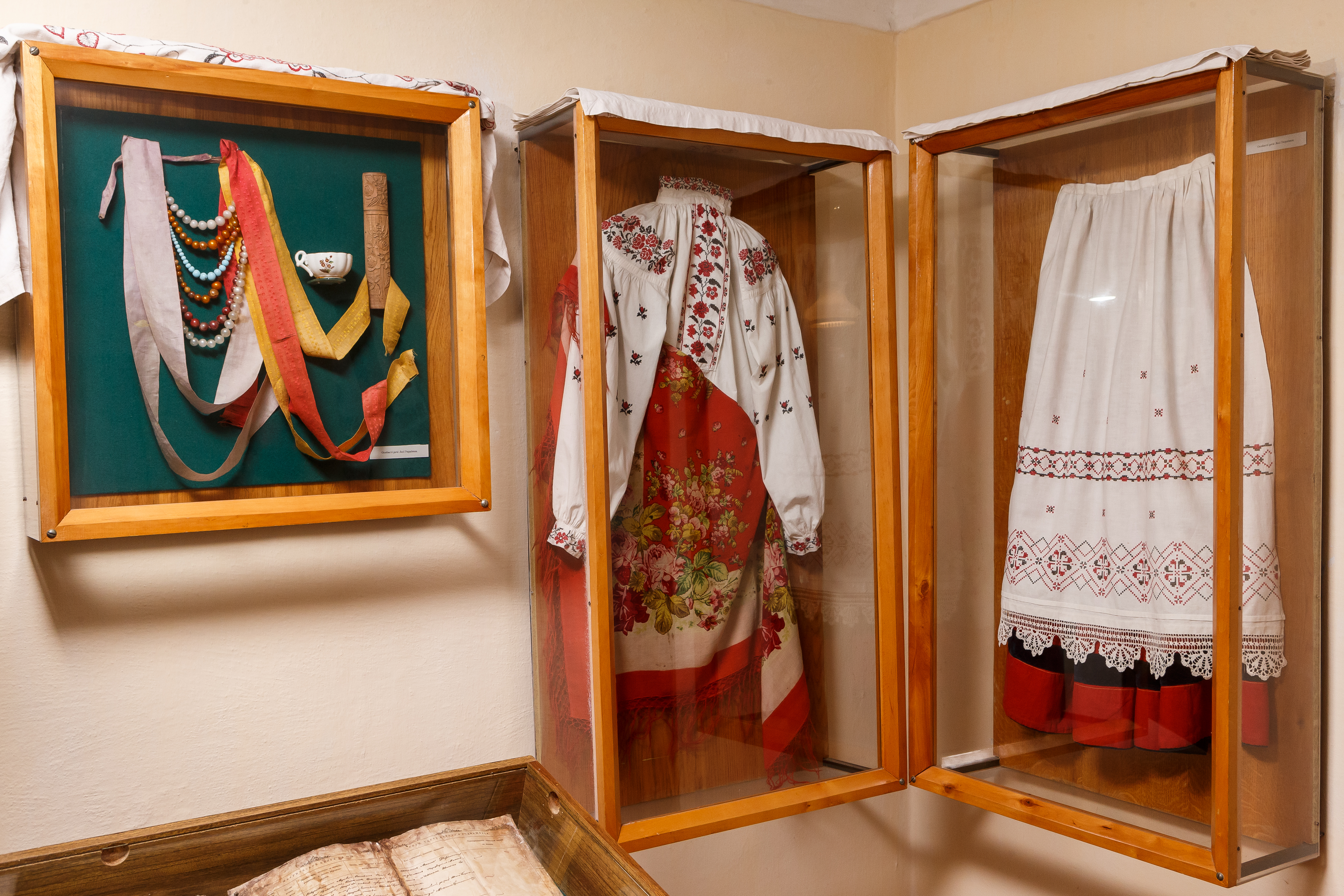 Особисті речі Лесі Українки, які експонуються у музеї поетеси в Новограді-Волинському. Фотограф Юрій Зубрицький. Новоград-Волинський.